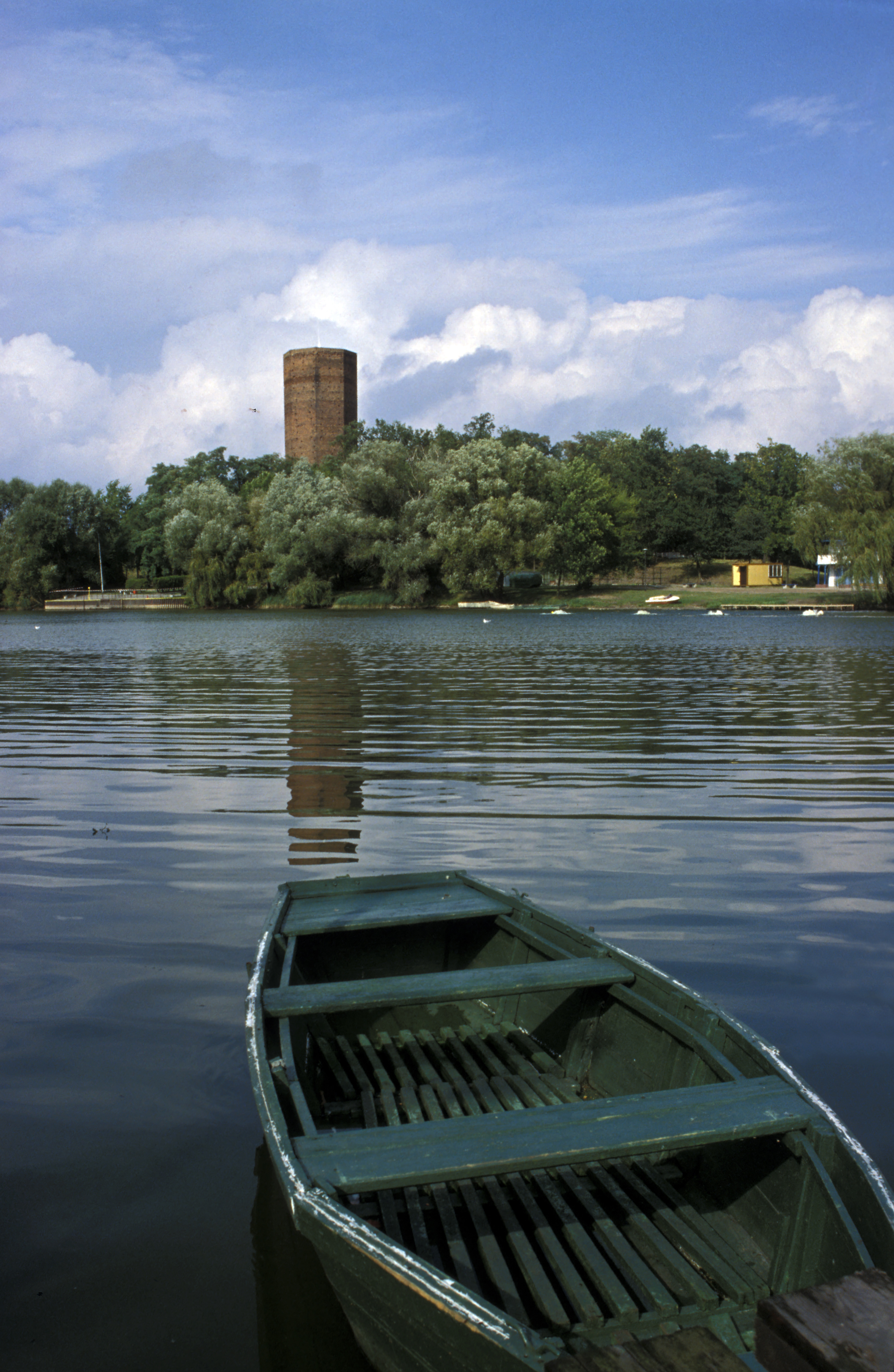 Poland, Kruszwica Castle